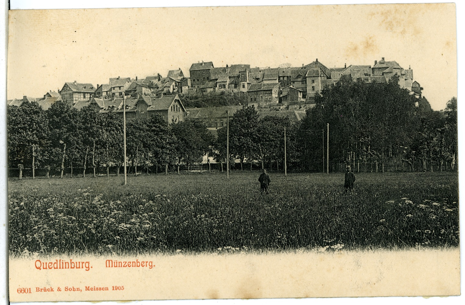 Quedlinburg; Münzenberg This postcard is from publisher Brück & Sohn in Meißen ( This postcard has a unique number 06601 and is available in a higher resolution at the publisher. This images was uploaded in a cooperation project between Wikipedians and the publisher.